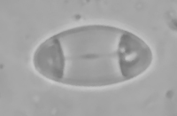 Spore von Xanthoria parietina im Lichtmikroskop - das extrem breite Septum ist typisch. An den beiden Sporenpolen ist das Lumen gut zu erkennen, zudem ein Plasmastrang, der sich durch das Septum zieht.